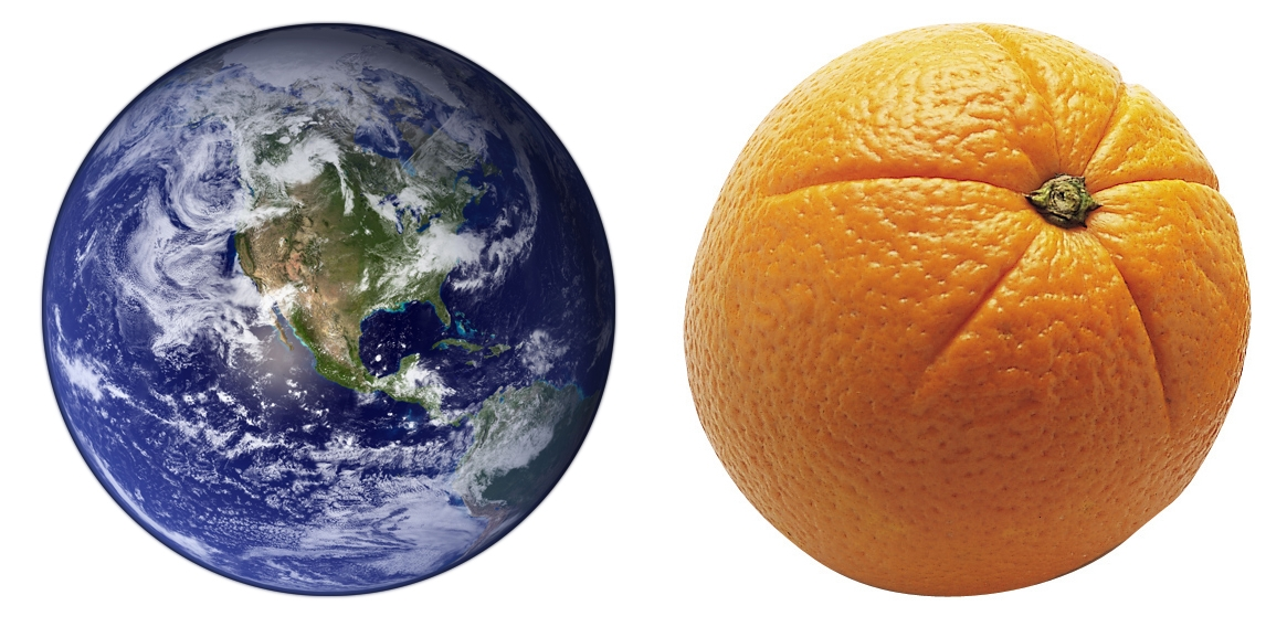 Image illustrant la formule du poète français Paul Eluard : « La Terre est bleue comme une orange »